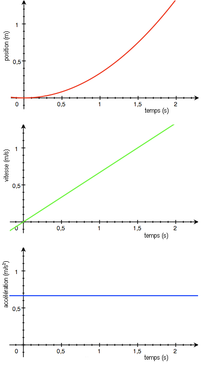 Evolution de la position, de la vitesse et de l'accélération d'un corps dans un mouvement rectiligne uniformément accéléré.